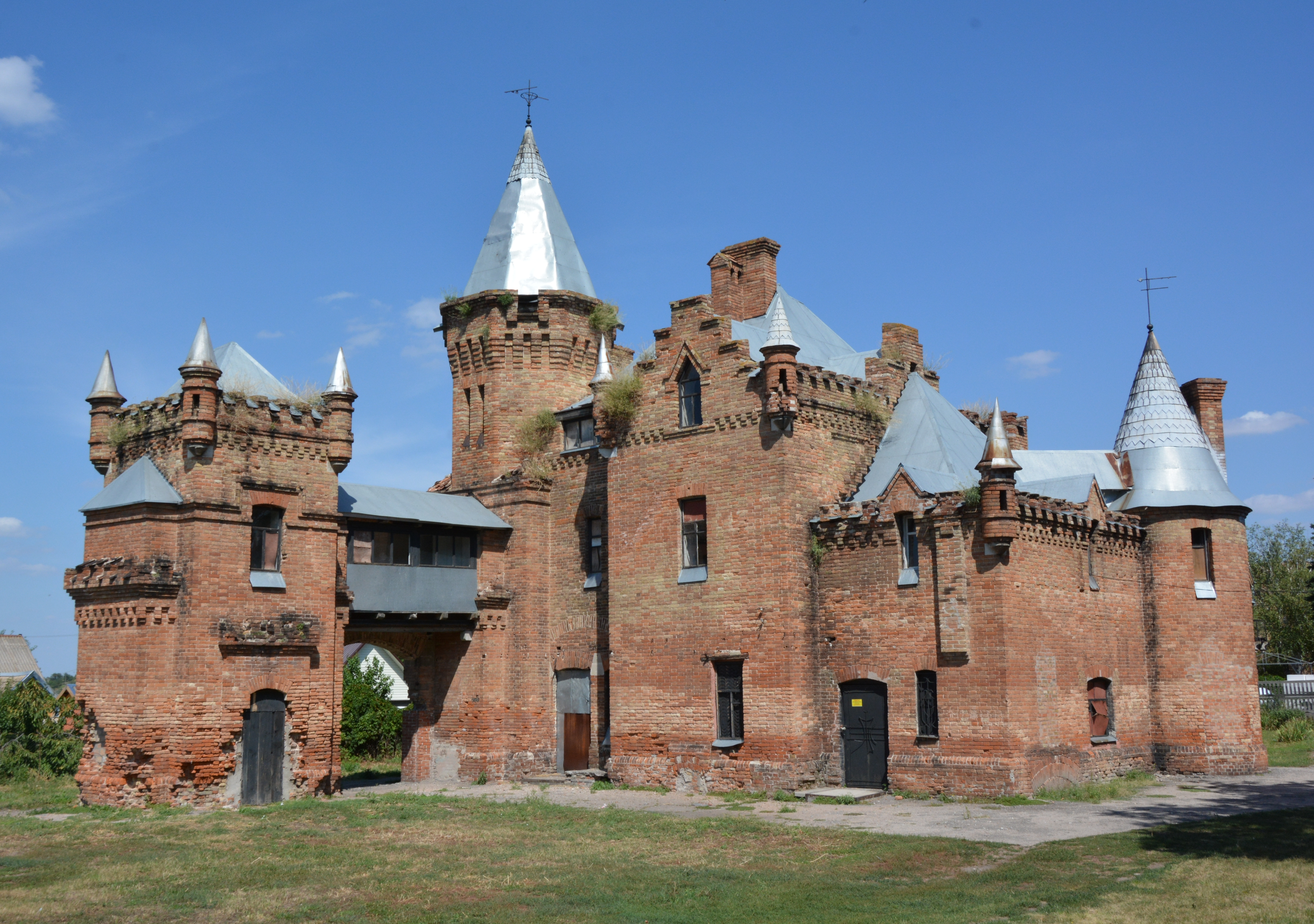 Флігель № 1, Василівка, вул. Гагаріна